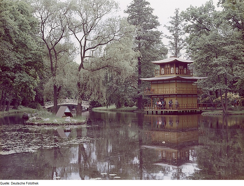 Original image description from the Deutsche Fotothek Wroclaw. Historische Gärten, Teehaus im Japanischen Garten (Szczytnicki Park)